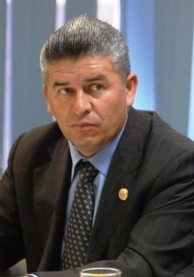 Dip. Arturo Torres Santos